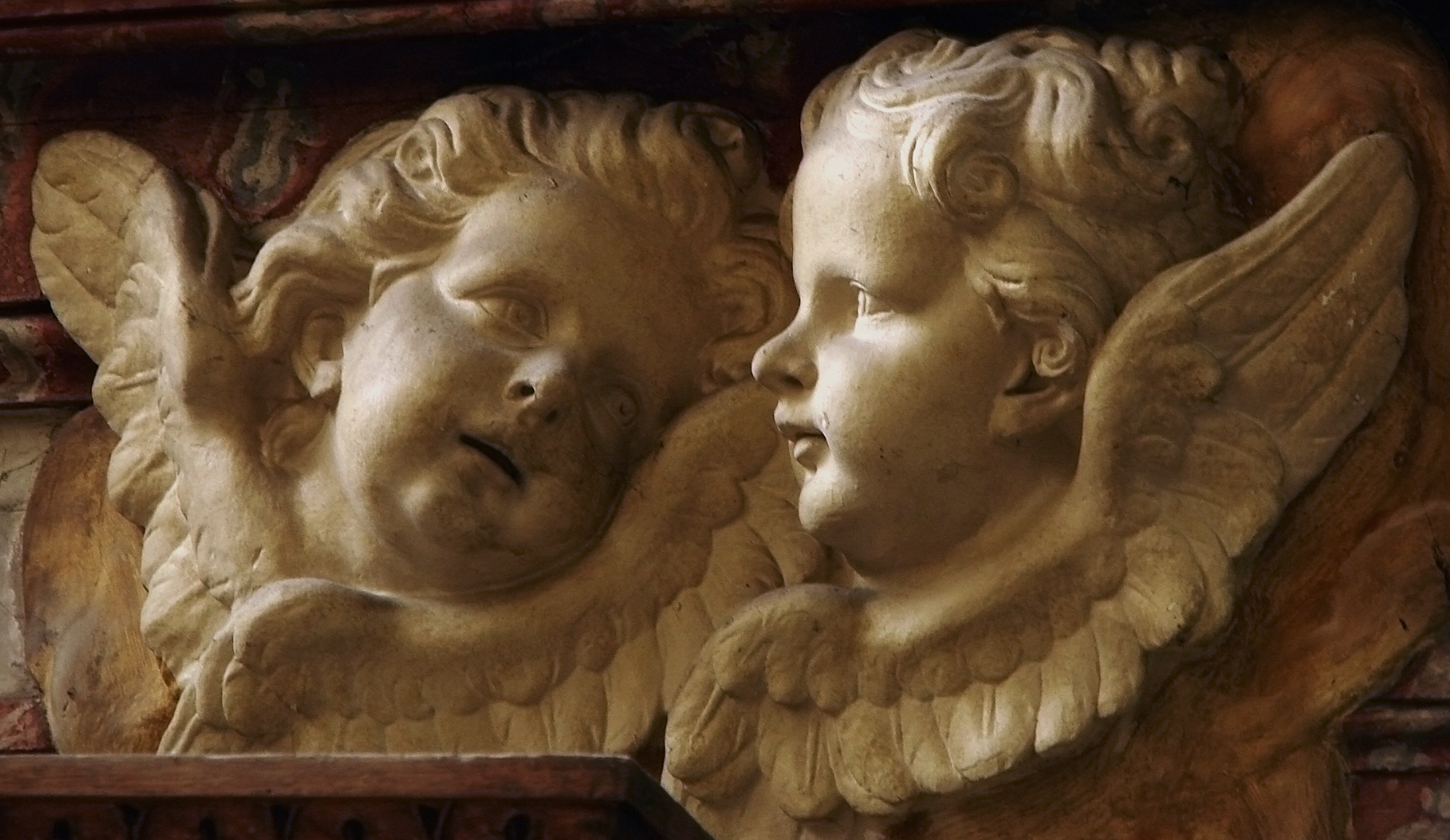 Détail du décor de la Chapelle Saint-Etienne dessiné par Christophle en 1768. Cathédrale d'Amiens.